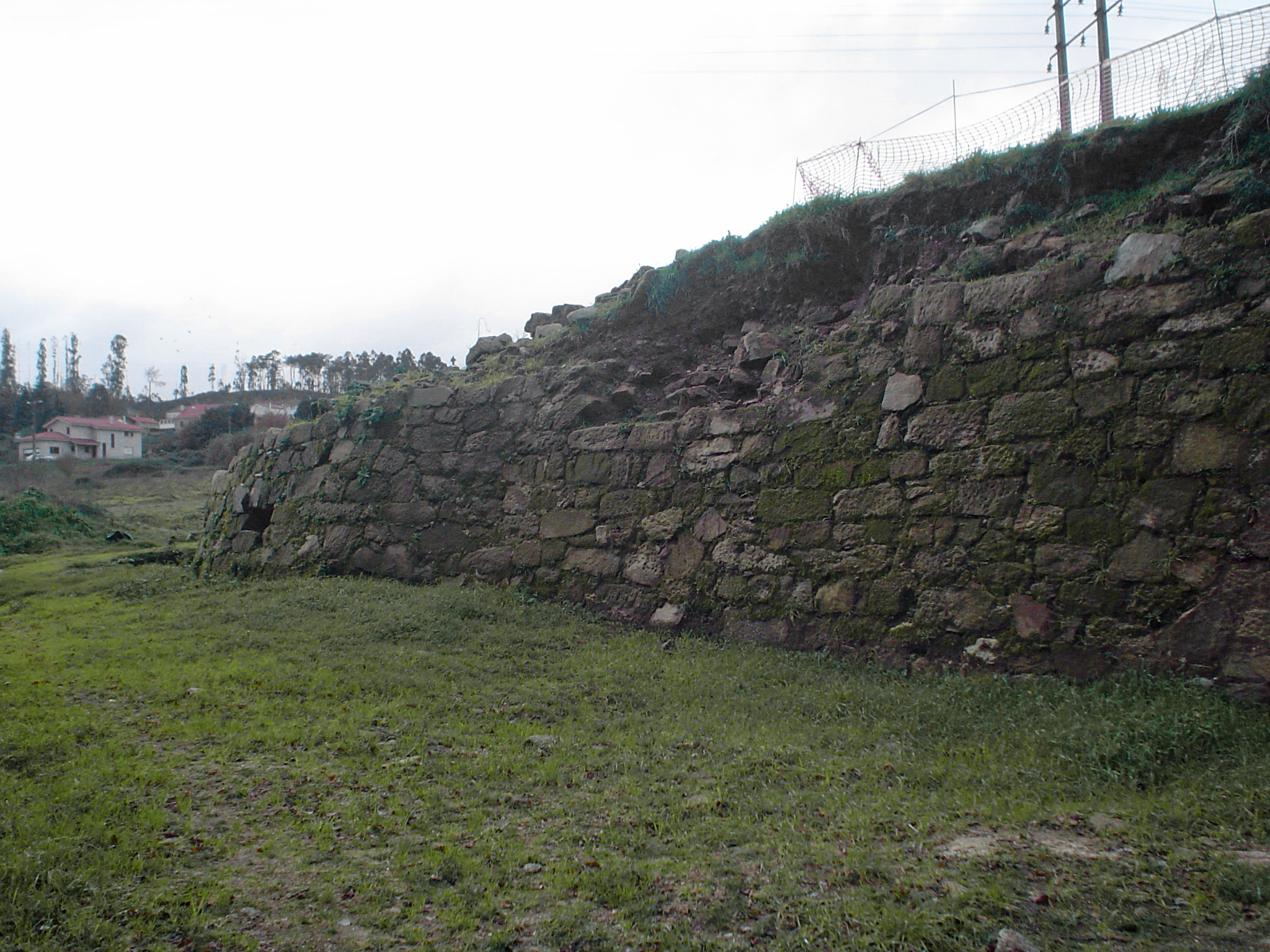 Castelo da Rocha forte. Conxo - Santiago. Muro do surleste